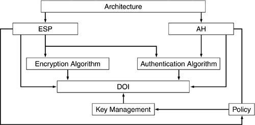 Монгол: architecture